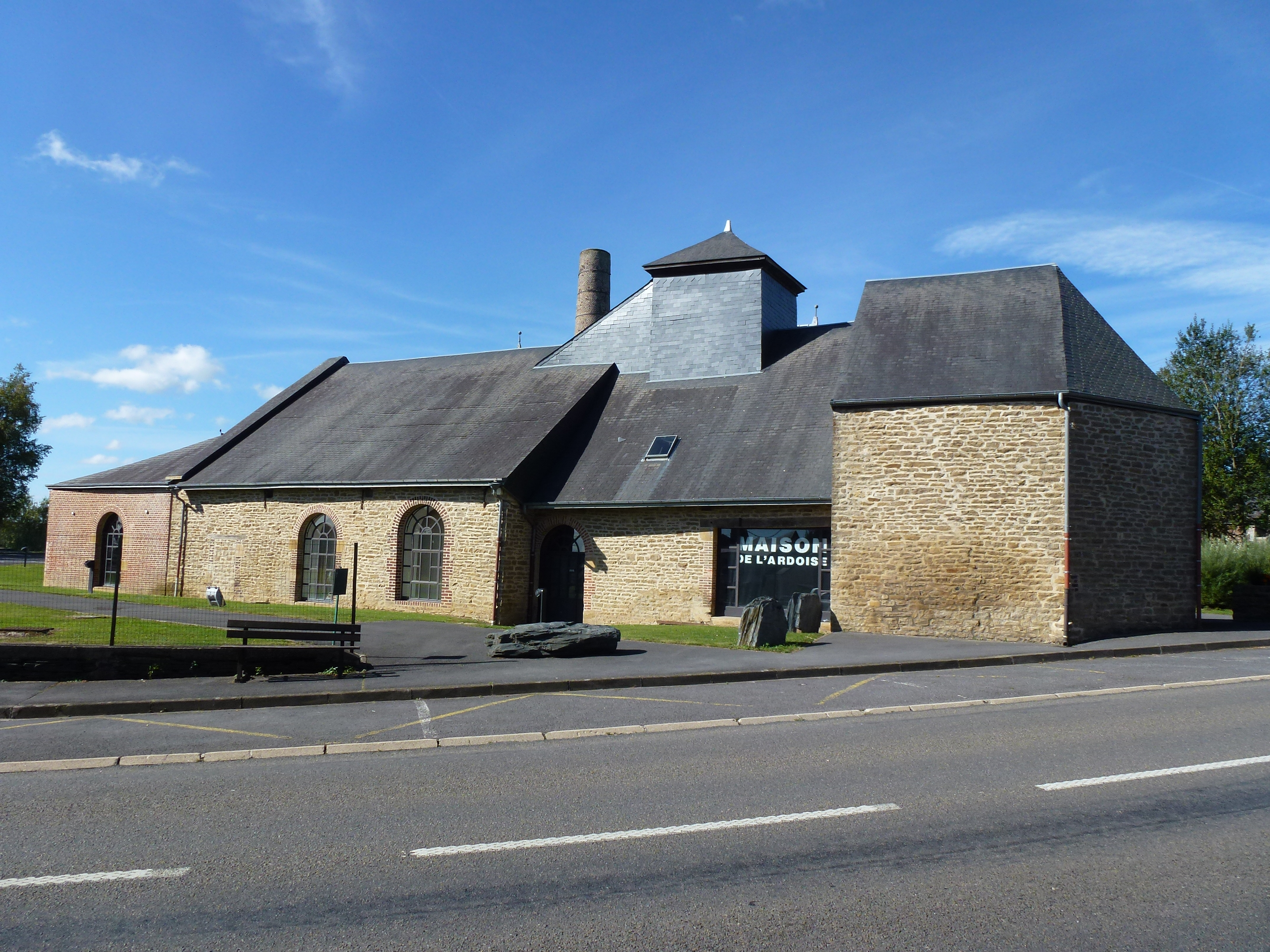 Rimogne (Ardennes) Maison de l' Ardoise (MH)